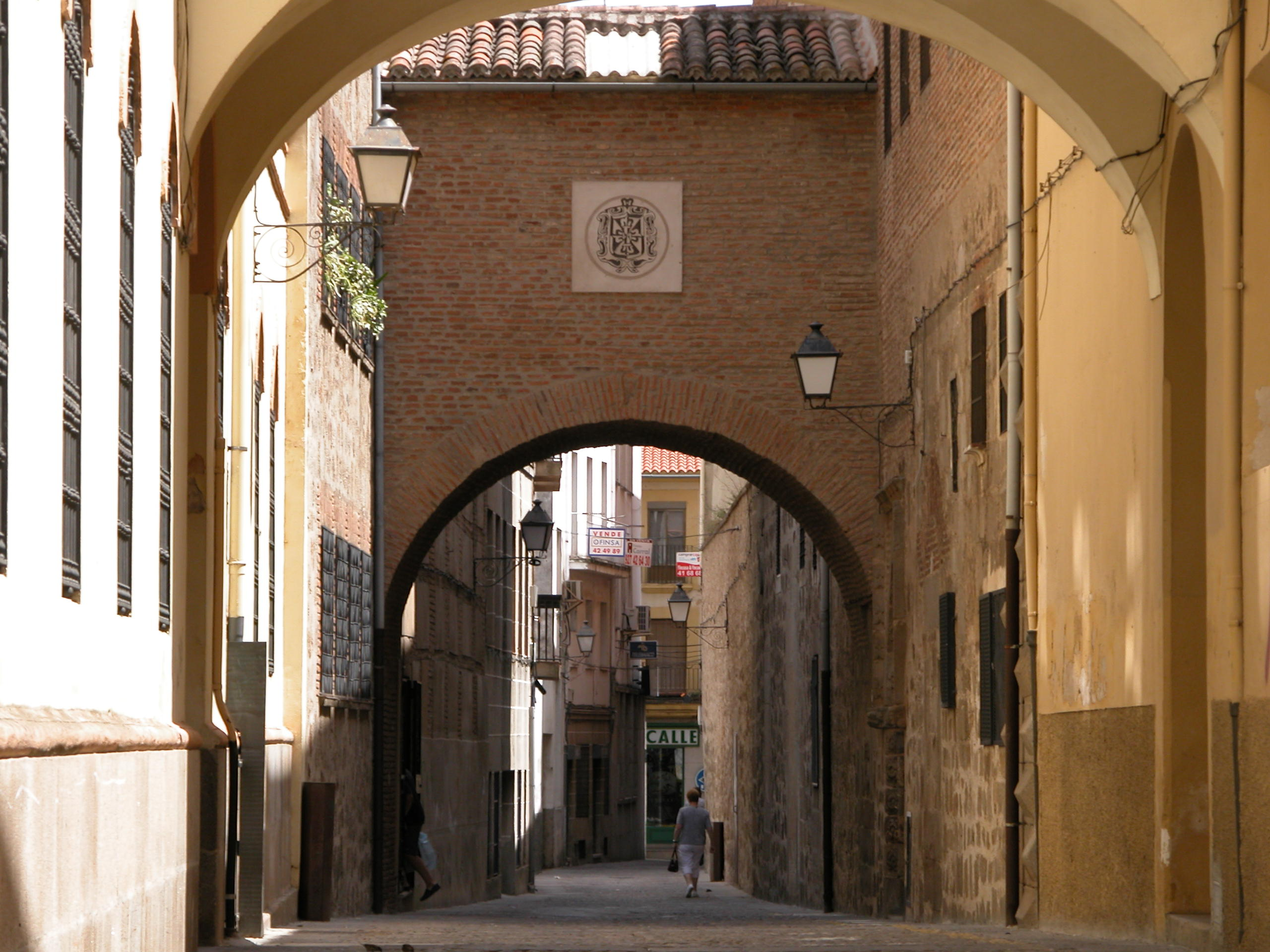 Pasaje den el convento de la Encarnación de Plasencia